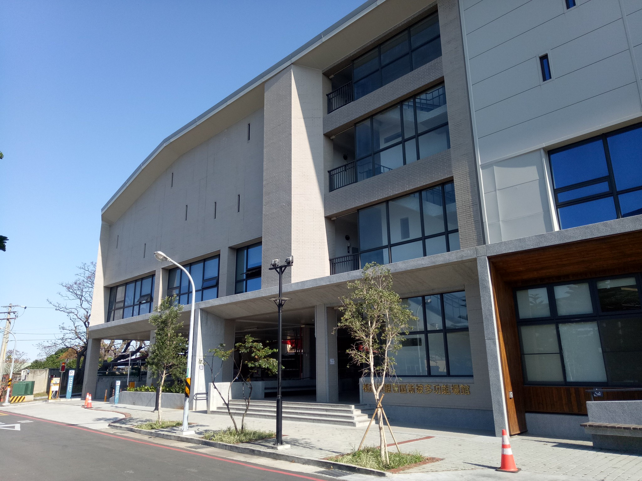 新坡多功能場館坐落於新坡國小周邊，涵蓋市立圖書館新坡分館、市立觀音幼兒園新坡分班及觀音區室內綜合球場等三大設施。